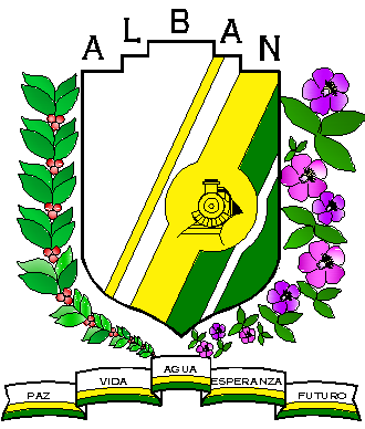 Escudo del Municipio de Albán Cundinamarca, Colombia